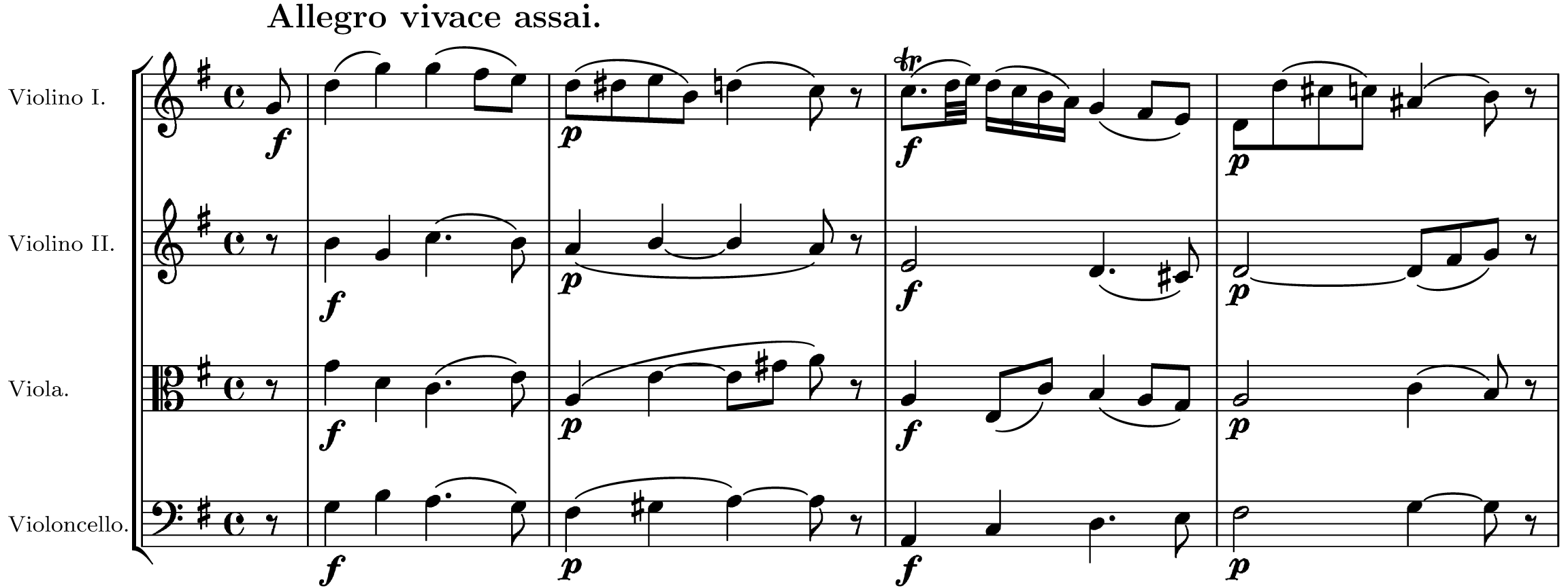 Extrait de la partition d'un quatuor dédié a Haydn de Mozart Catégorie:Œuvre musicale